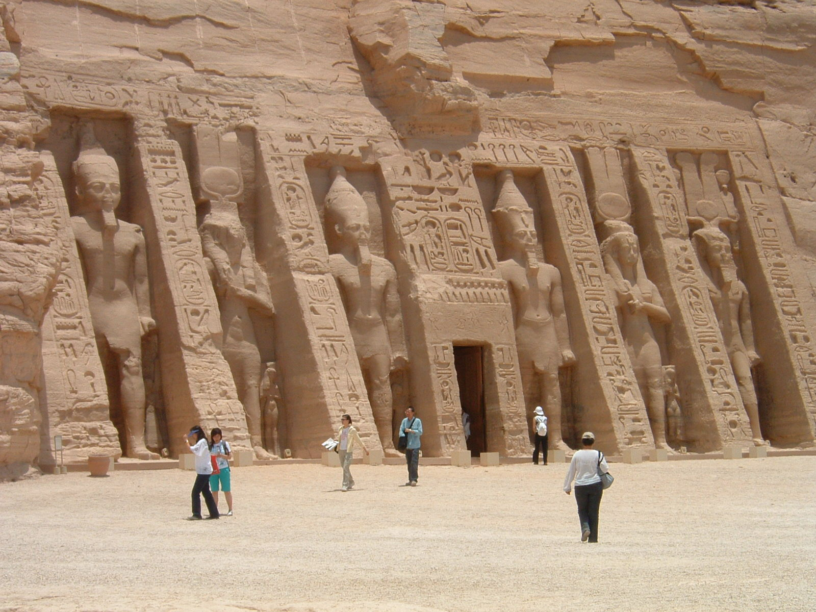 Foto scattata da me